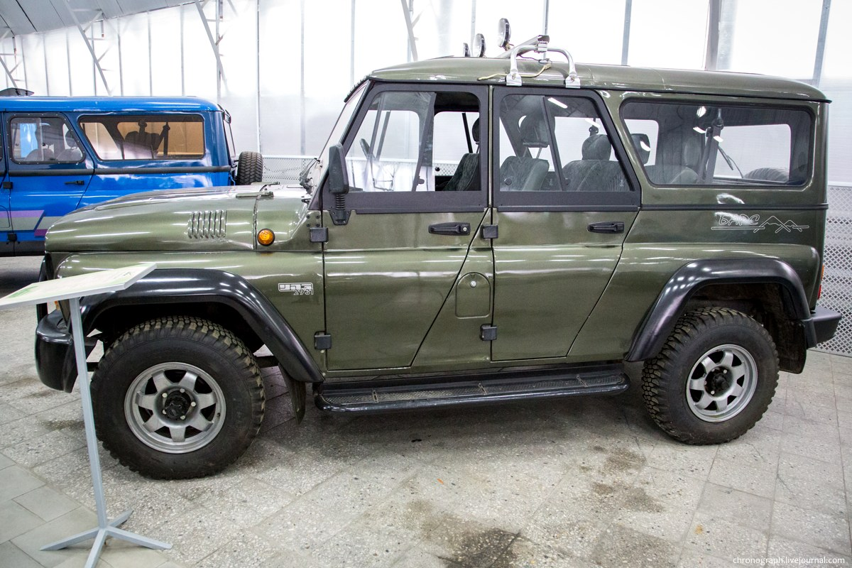 УАЗ «Барс». Выставочный павильон-музей УАЗа.